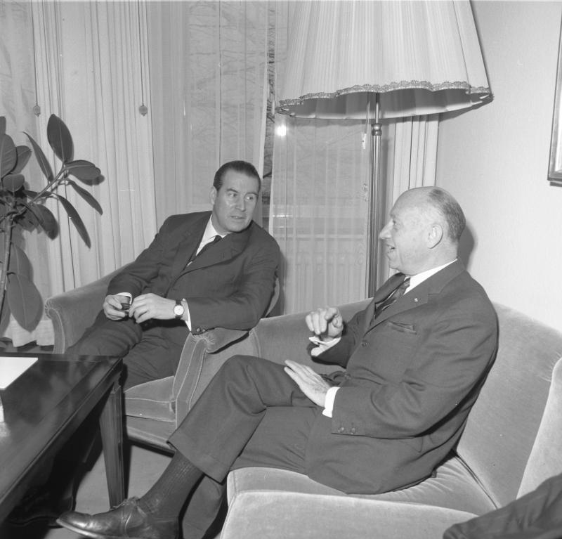 BM Schröder empfängt Senator Javits, USA, im Auswärtigen Amt